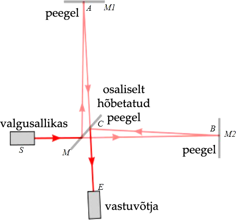 Michelsoni interferomeeter